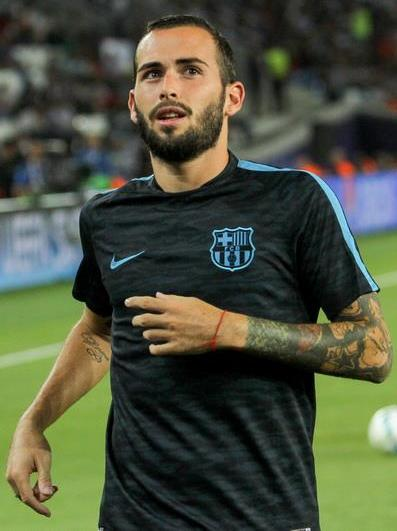 Перед матчем за Суперкубок УЄФА 2015 року у Тбілісі. Грузія